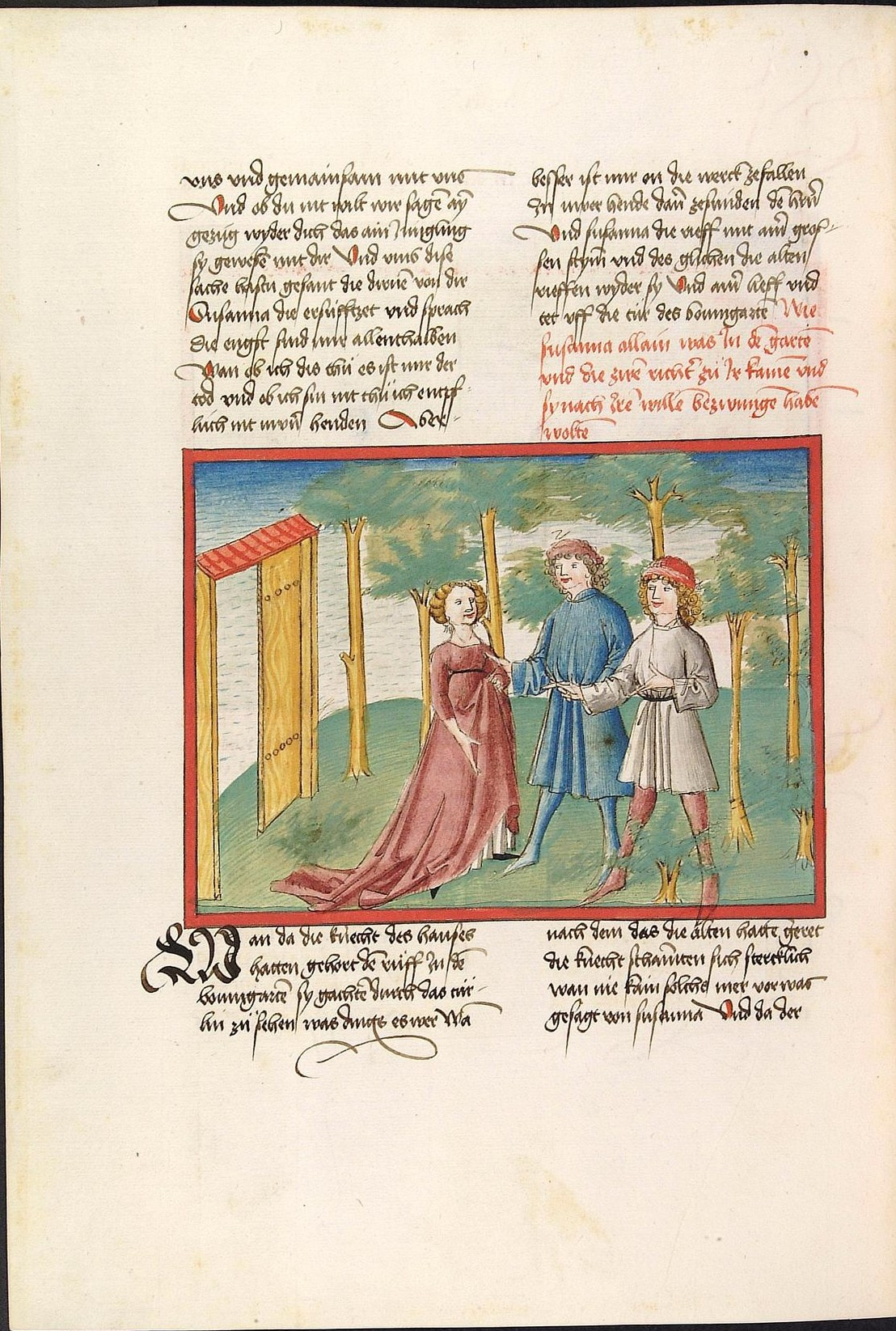 Codex Palatinus germanicus 18, Blatt 327v - Bibel, Altes Testament, Buch Daniel: Susanna steht alleine mit hochgeschürztem Kleid den beiden Alten im Garten gegenüber. Sie wird bedrängt von den Alten, von denen sie einer am Arm gepackt hat. (Cpg 18 = Bibel AT, deutsch: Psalter, Parabole, Ecclesiastes, Cantica canticorum, Sapienta, Ecclesiasticus, Propheten)